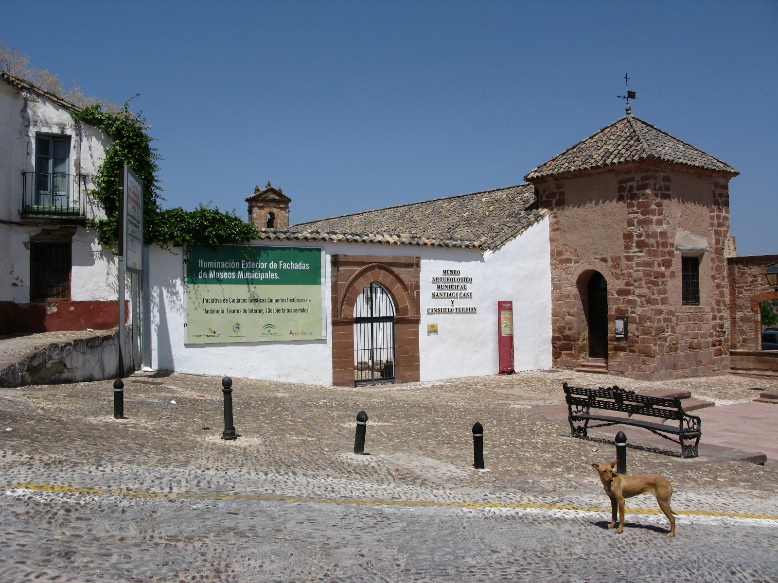 Plaza de Santa María de la Mota o del Castillo en Montoro y entrada al museo arqueológico local